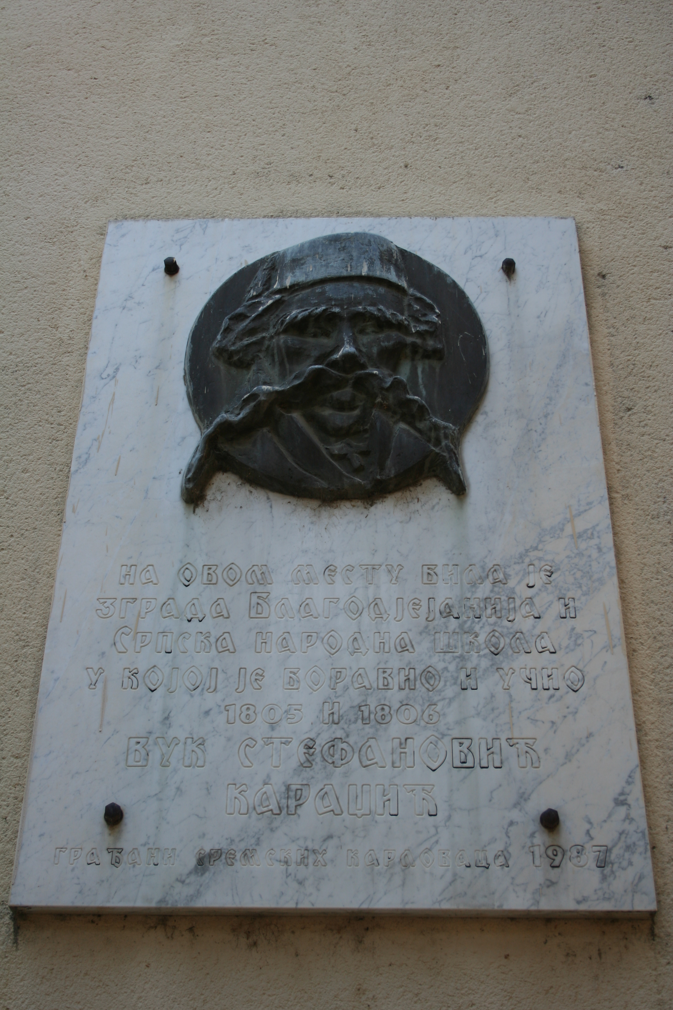 Gradsko jezgro (Sremski Karlovci)